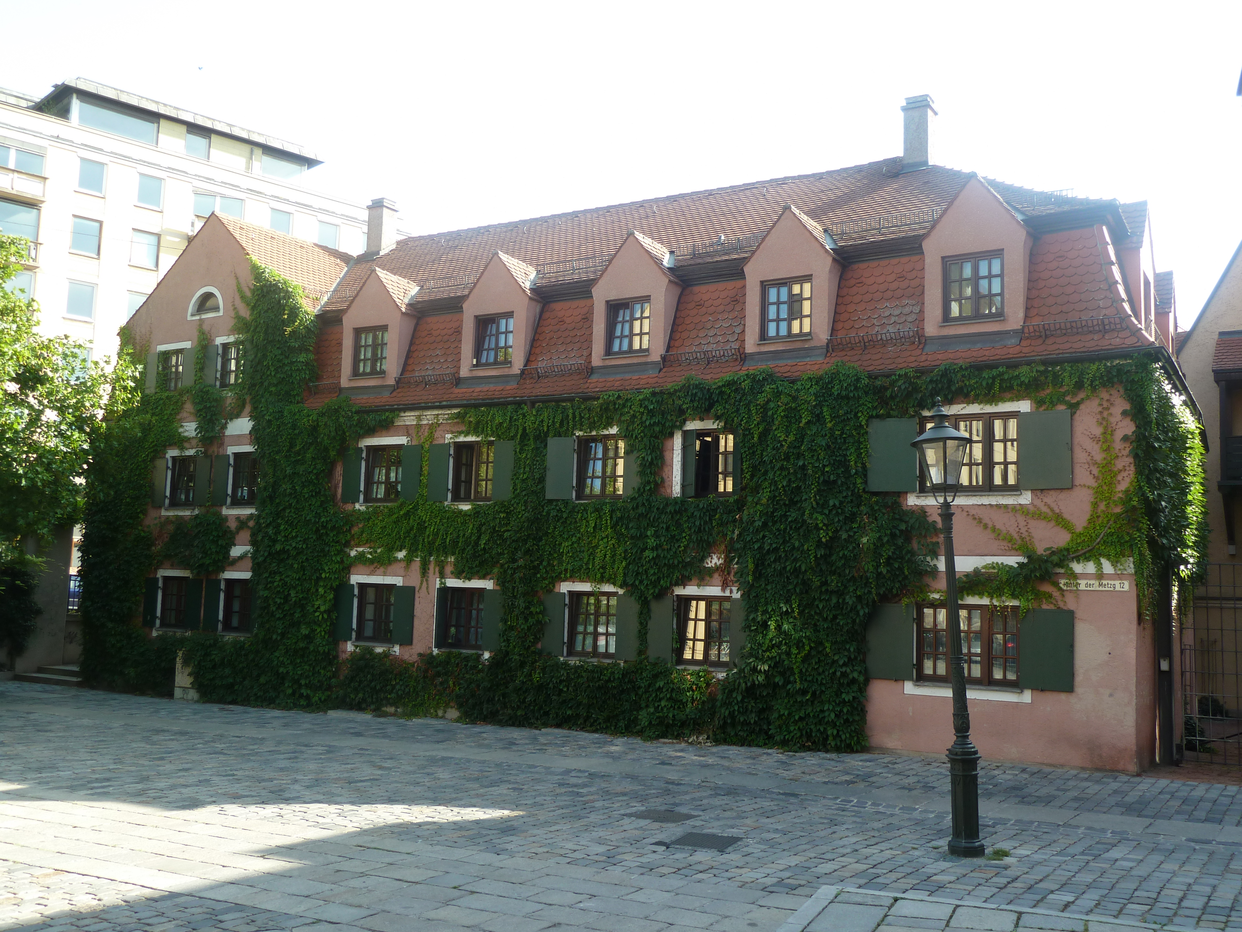 Wohngebäude des Domstifts Augsburg